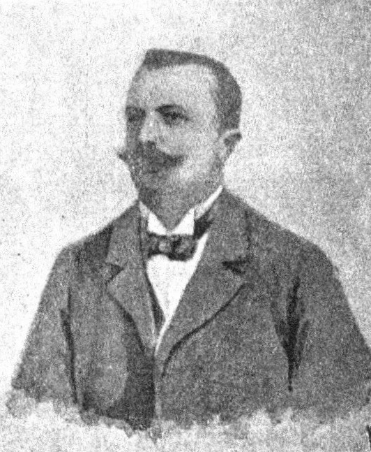 Österreichischer Politiker, Reichsratswahl 1907, Name siehe Dateiname